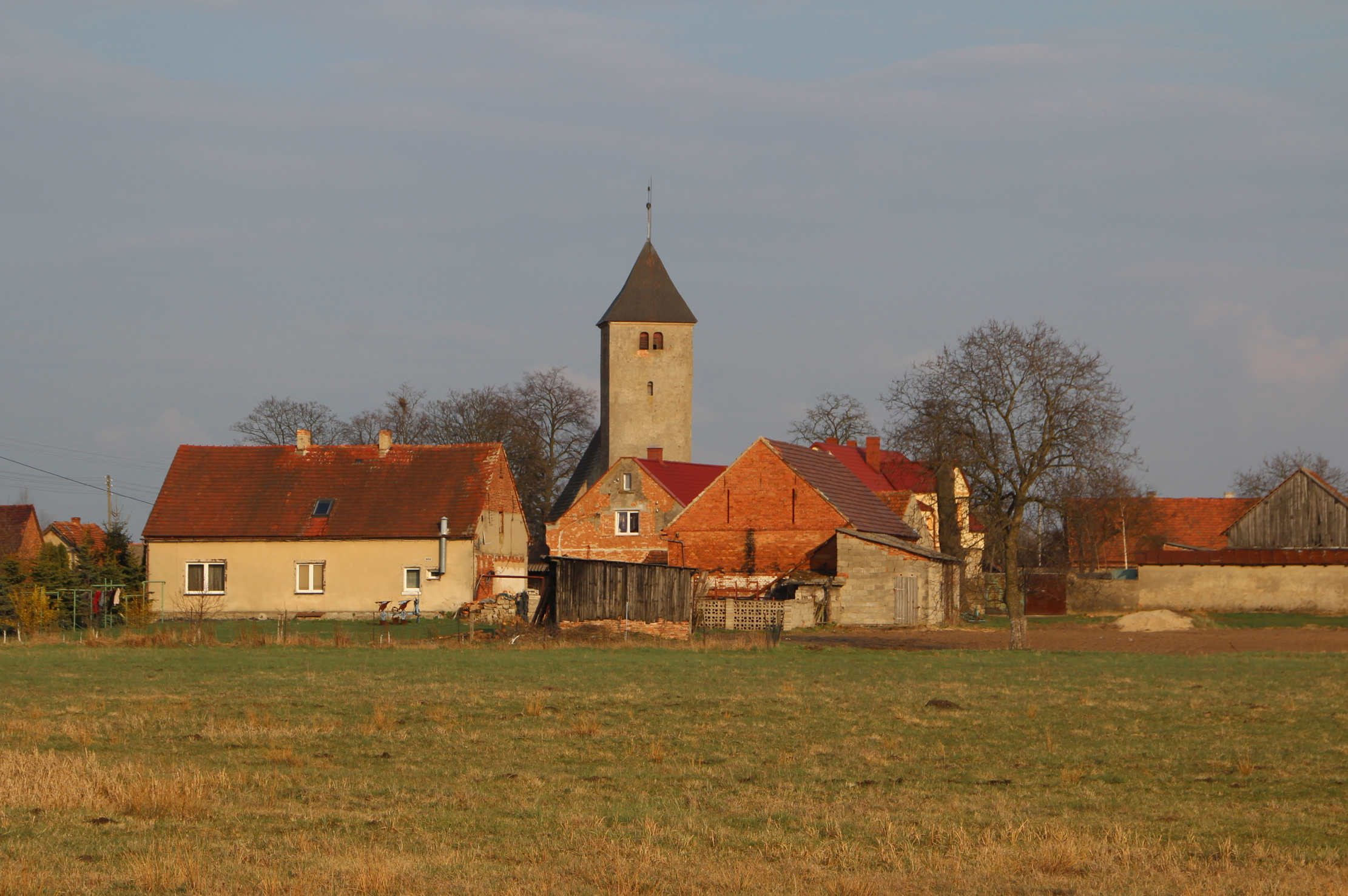 Łagoszów Wielki – województwie dolnośląskim, w powiecie polkowickim, w gminie Radwanice.